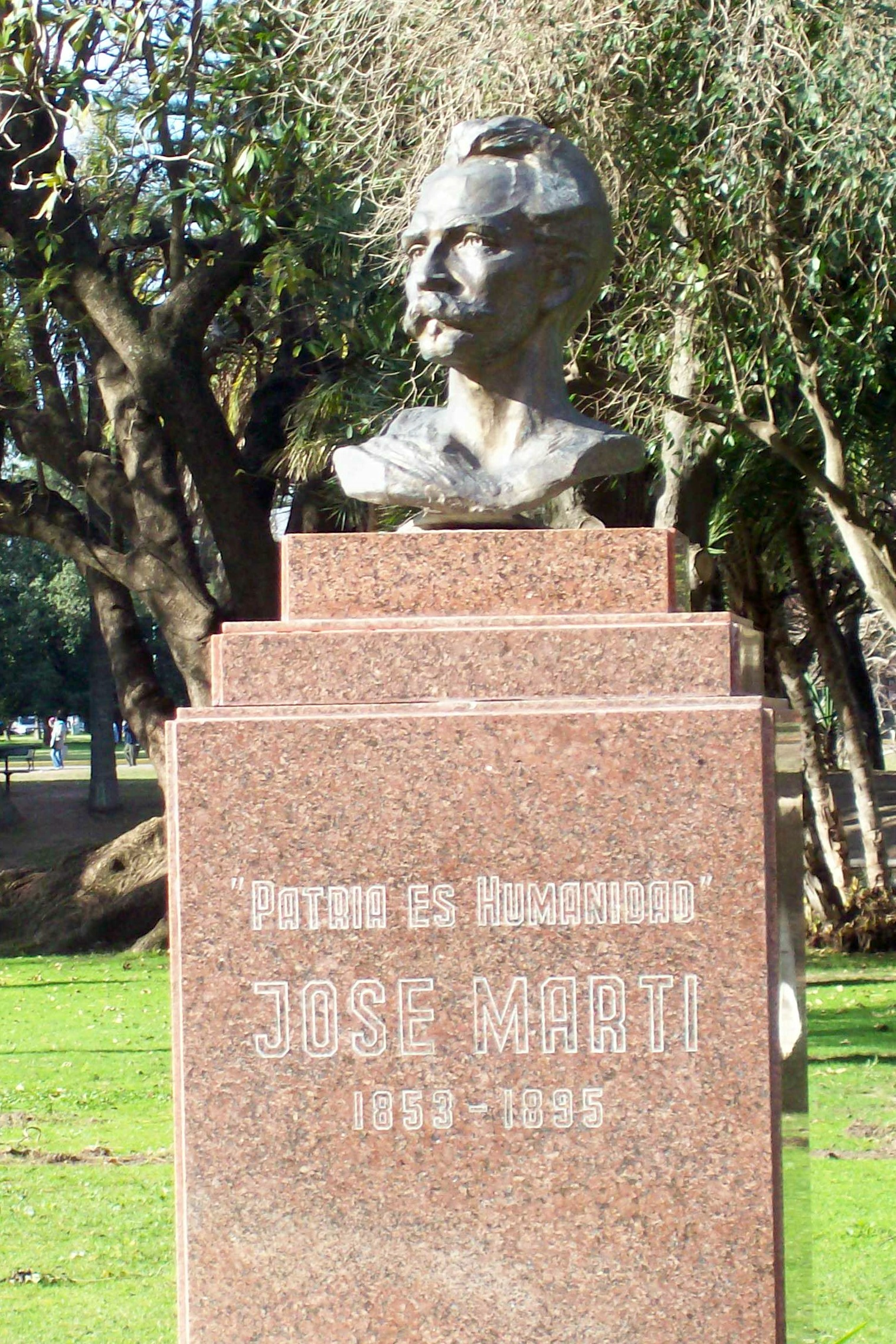 Busto de José Martí en El Rosedal de Palermo, Buenos Aires